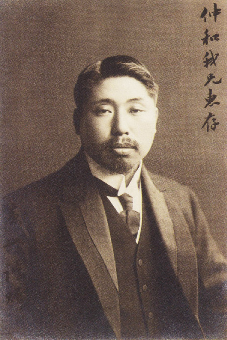 黄兴赠章宗祥的照片